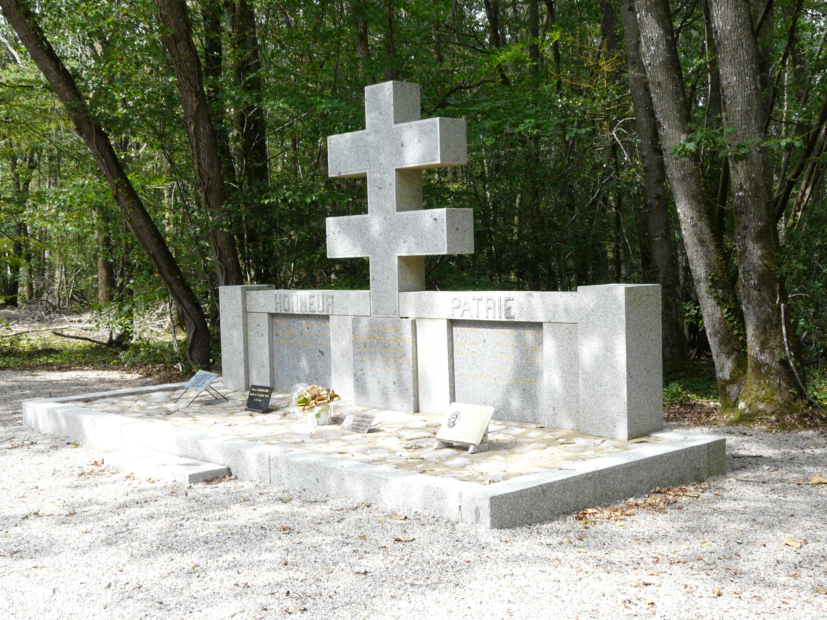 Stèle du Monument de Bout-de-Forêt